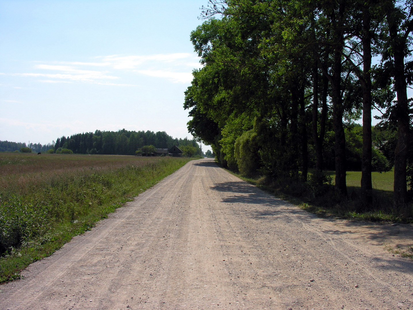 Rekečiai, Mažeikių raj., Viekšnių sen. Kelias per Rekečių kaimą iš Viekšnių į Laižuvą Foto: Algirdas, 2006 m. rugpjūčio 11 d., Lietuva